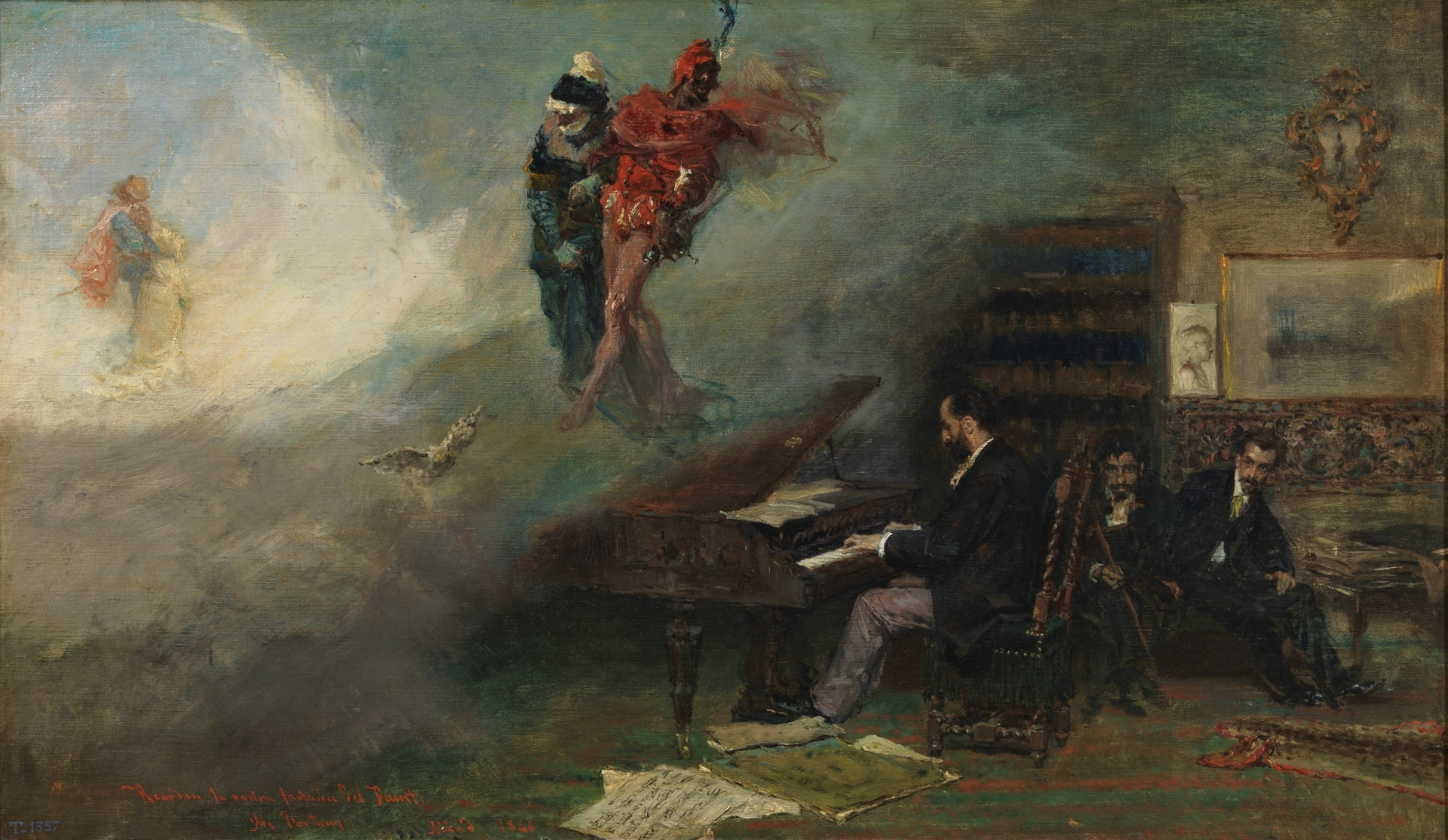 "Fantasía sobre Fausto" (1866), de Mariano Fortuny y Marsal (1838-1874). Homenaje a la música y a su ejecución virtuosa, esta obra es fruto de la interpretación que Juan Bautista Pujol (1835-1898) hizo de su Gran fantasía para piano basada en motivos de la ópera Fausto de Charles Gounod en el estudio del pintor Francisco Sans y Cabot (1834-1881).